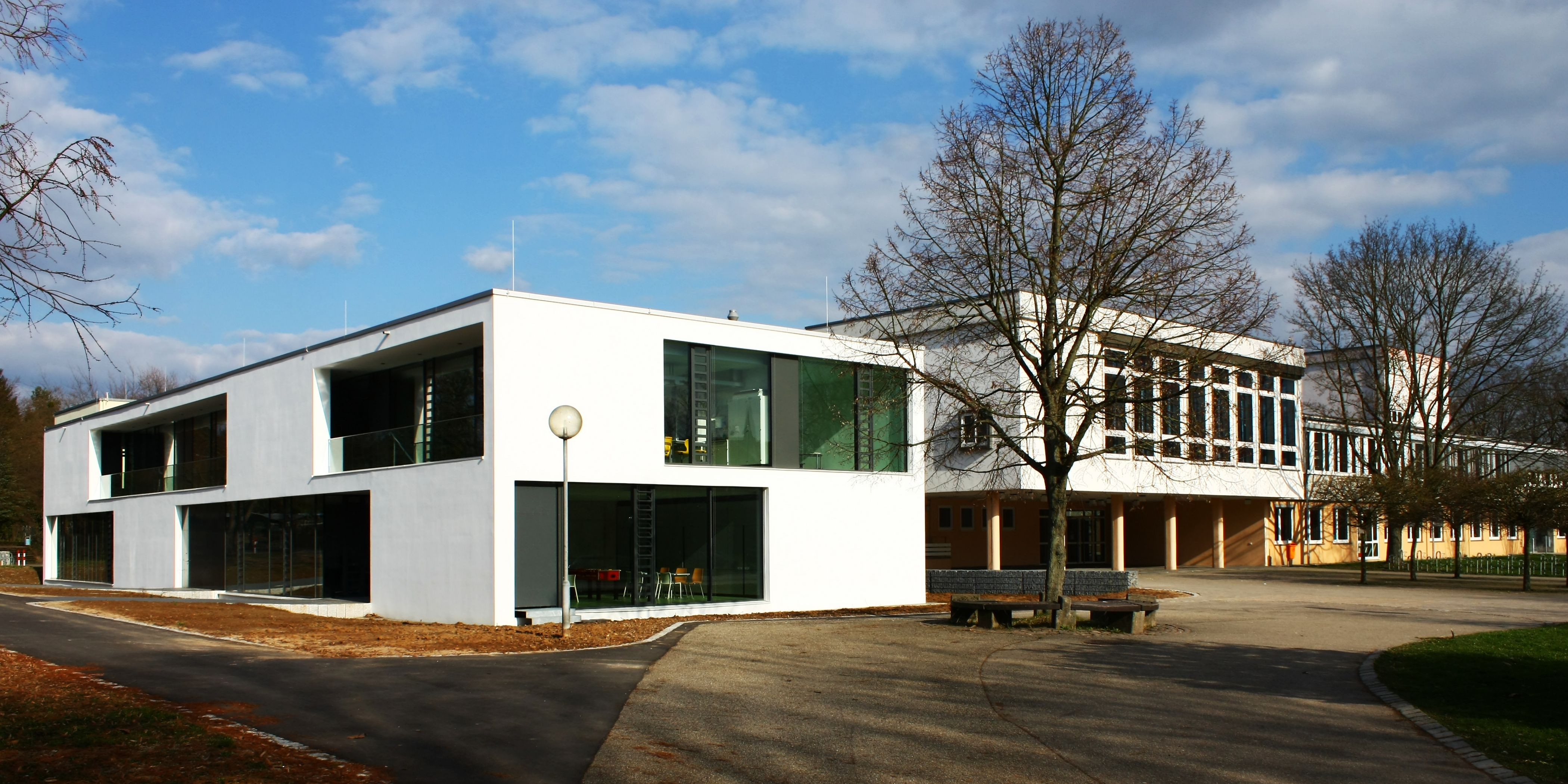 Das Albert-Schweitzer-Gymnasium in Neckarsulm, von rechts: Altbau (1950er Jahre), Aula, Neubau (2008)